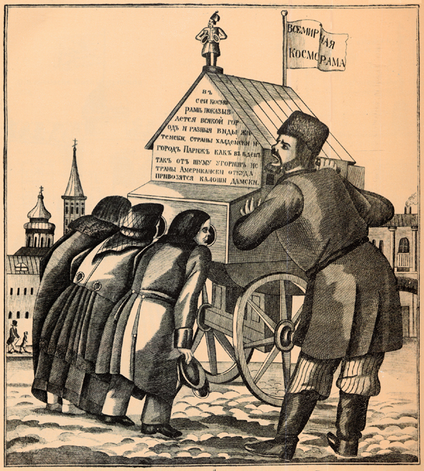 Rosyjska litografia ludowa, rok 1858. Autor nieznany. Z książki Łubok Wyd. Aurora Leningrad 1974 Napis na chorągiewce: WSZECHŚWIATOWA KOSMORAMA Napis w trójkątnym polu: W tej kosmoramie pokazuje się wszelkie miasta i różne sposoby życia, kraje chaldejskie i miasto Paryż gdzie od hałasu ogłuchniesz i kraje amerykańskie skąd przywozi się kalosze damskie. W kosmoramie pokazywano drzeworyty ludowe "Łubok" sklejone w długą taśmę, przewijane z wałka na wałek.